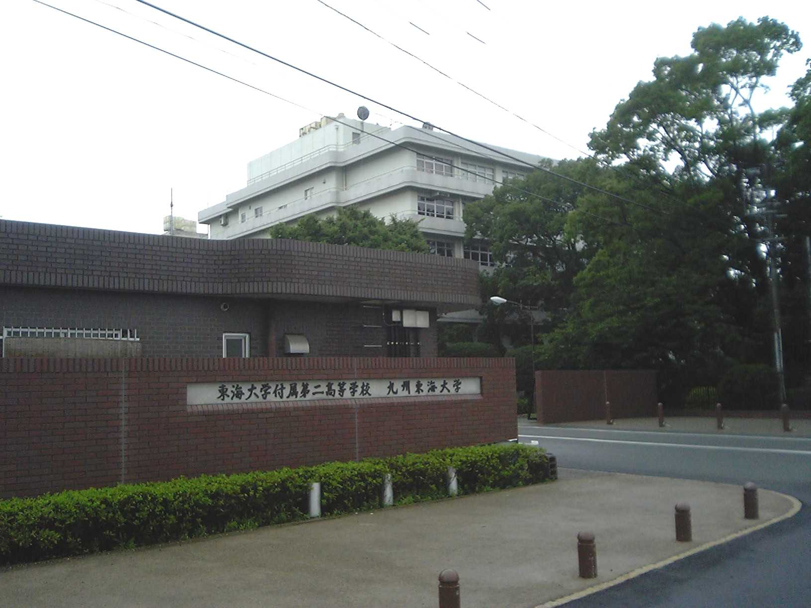 九州東海大学2007年7月7日投稿者が撮影